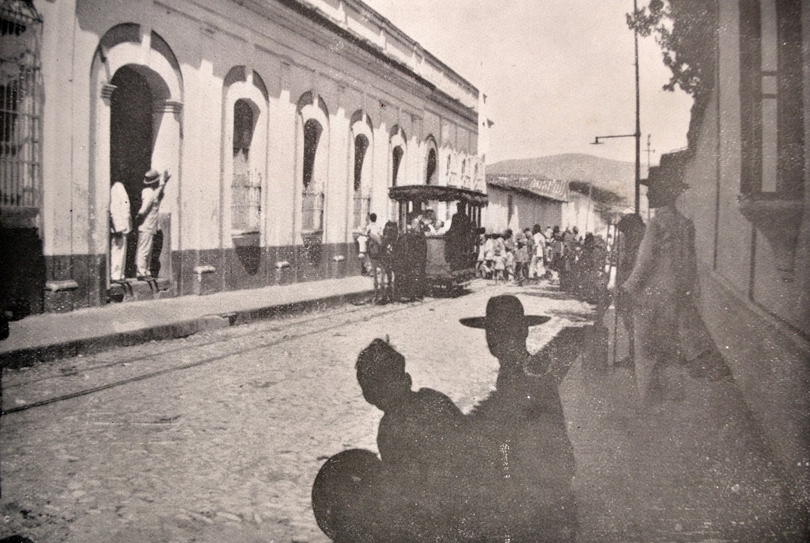 Tranvia de Barquisimeto (1898)